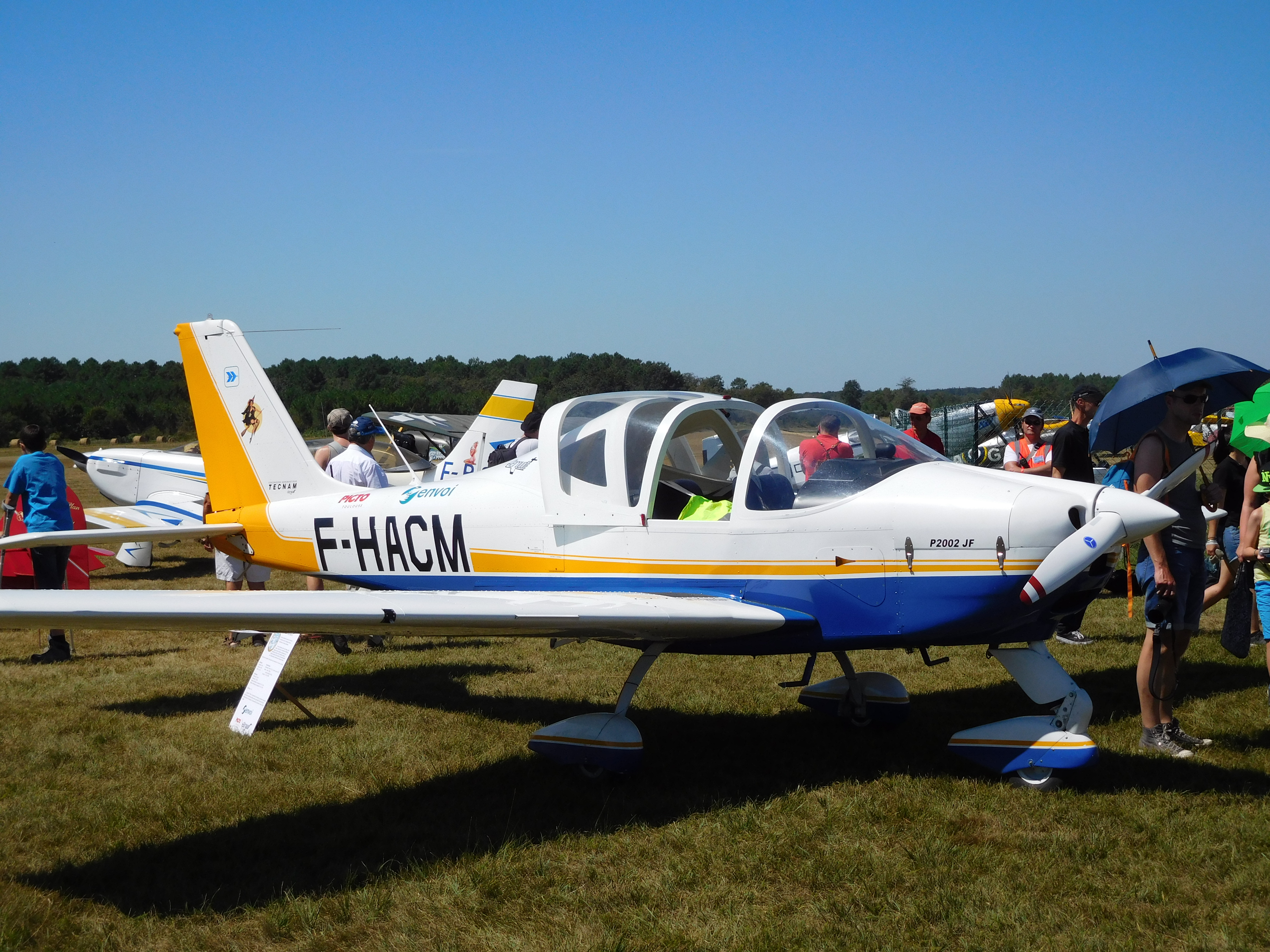 Tecnam P2002 JF, F-HACM, fait partie de la flotte de l'aéroclub des Ailes toulousaines et de la patrouille Yellow (patrouille civile amateur créée en 2011). Biplace léger de construction métallique, masse à vide : 360 kg, masse max. au décollage (MTOW) : 600 kg. Moteur Rotax 912 S2 de 100 ch. Vitesse max. : 222 km/h. Certification VLA (Very Light Aircraft).